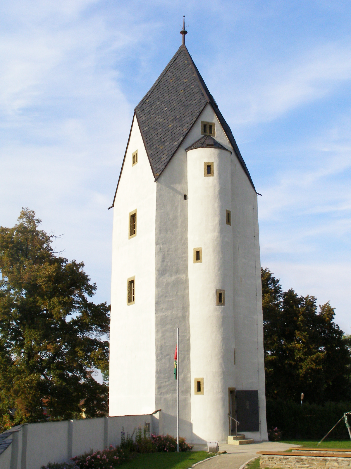 Černá věž v Drahanovicích